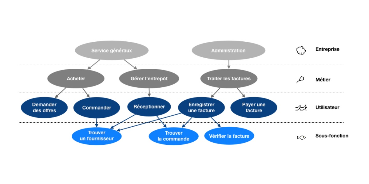 Exemple de cartographie de cas d'utilisation organisée par niveaux d'objectifs